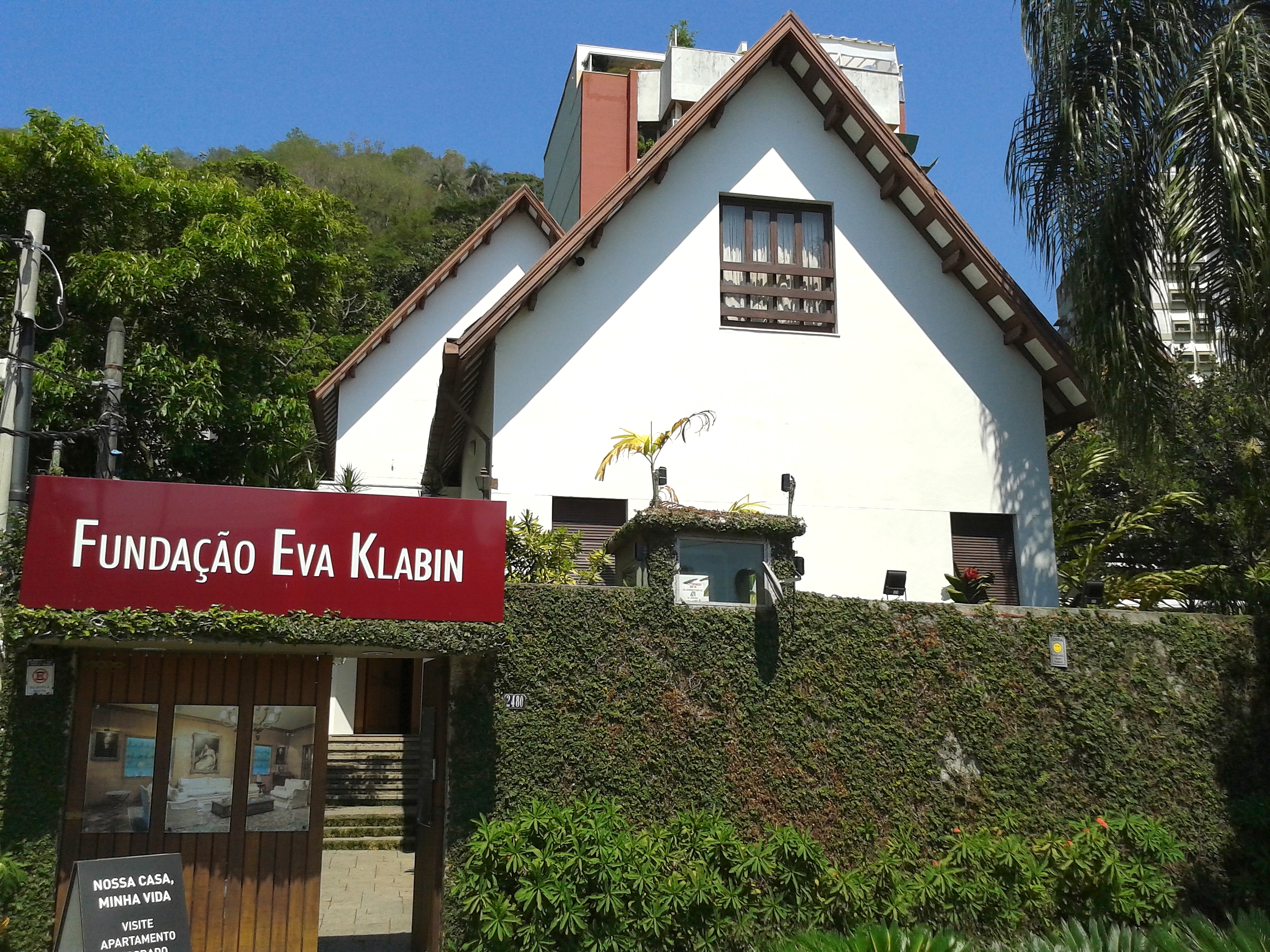 Fundação Eva Klabin, Rio de Janeiro, RJ.